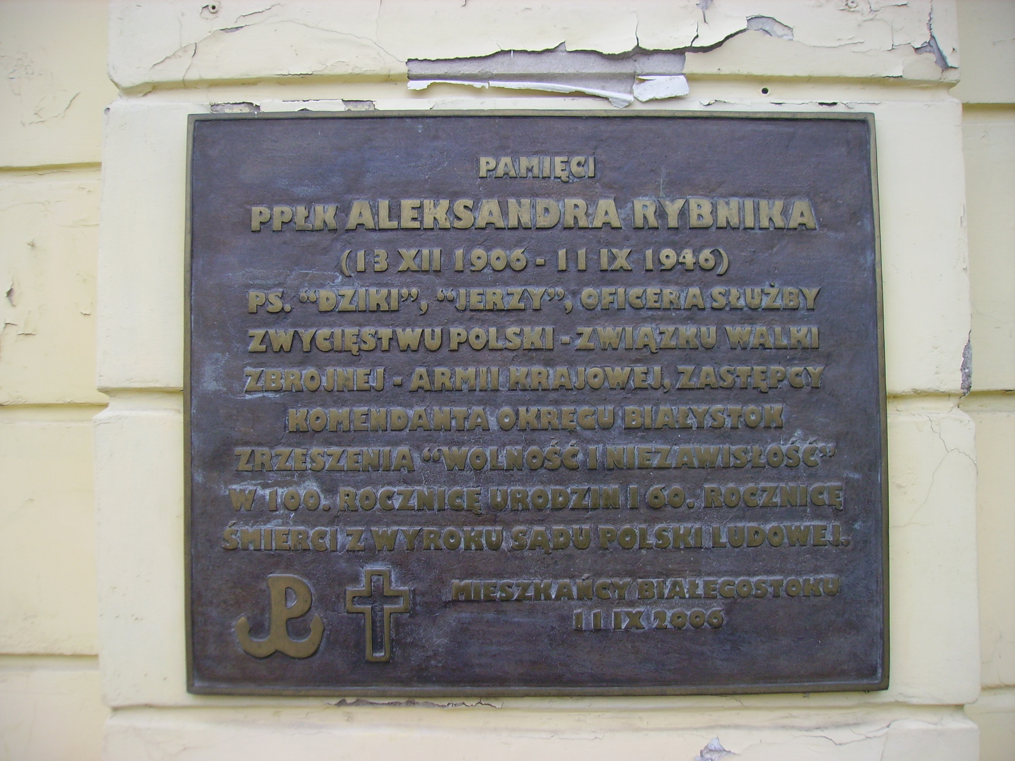 Tablica upamiętniająca ppłk Aleksandra Rybnika na budynku Kina Ton w Białymstoku (Rynek Kościuszki 2).